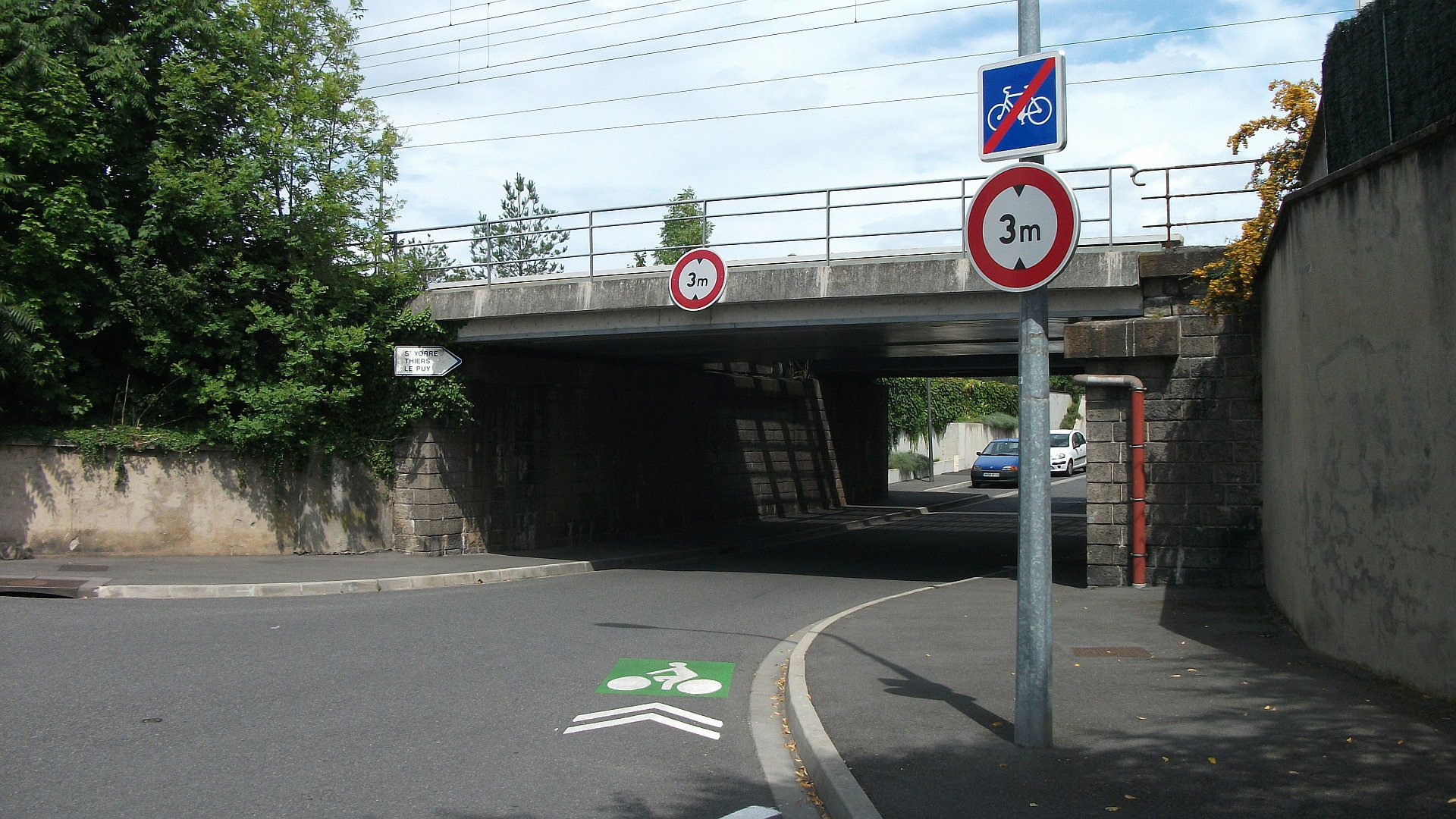 L'avenue de Lyon vers l'avenue de Gramont. La hauteur limitée est de 3 m.Panneaux visibles : Fabricant Lacroix signalisation C114 : Fin de bande cyclable conseillée (2011 sur mât éclairage public) B12 : Limitation de hauteur (2007 sur mât éclairage public) B12 : Limitation de hauteur (2007)